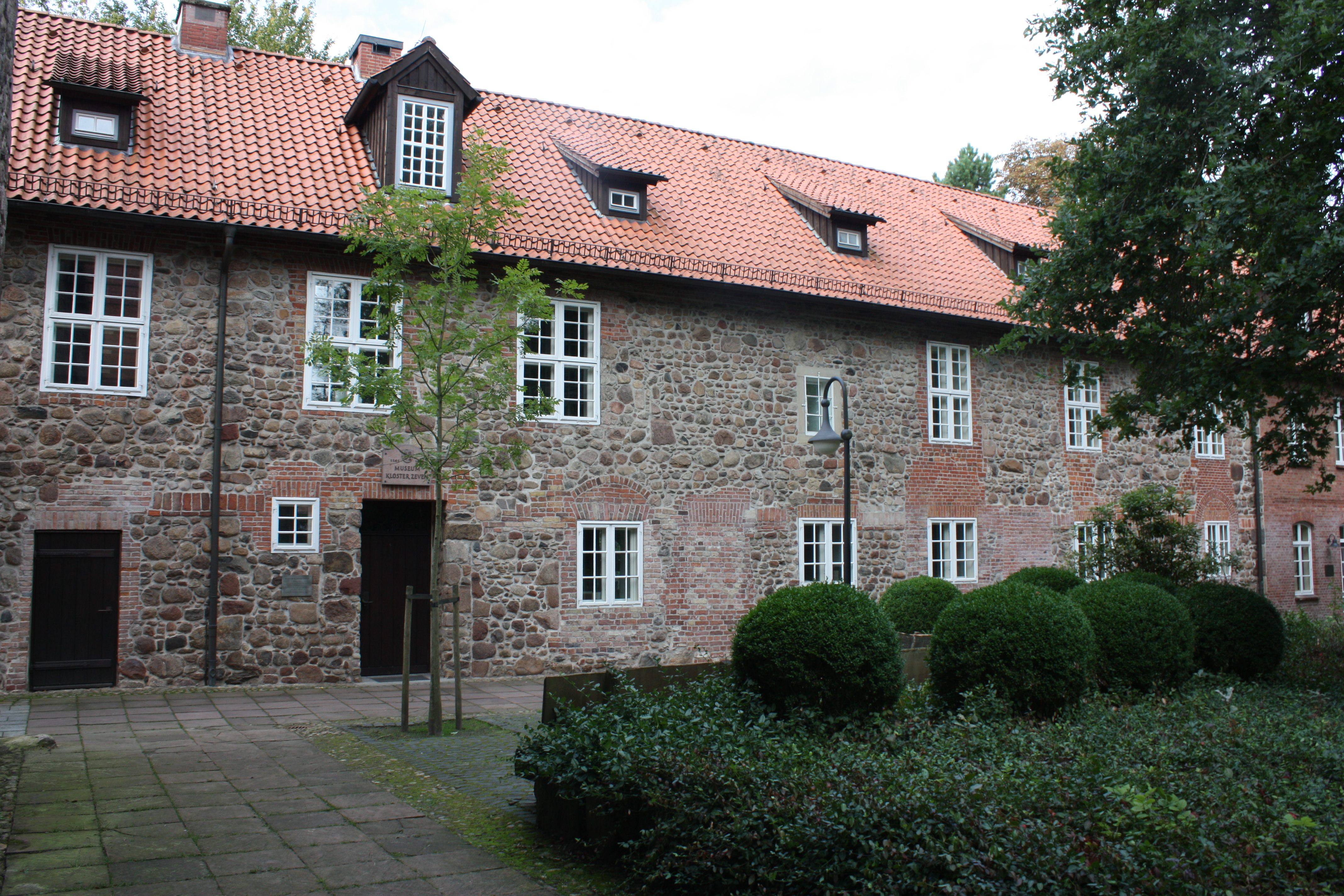 Kloster Zeven und St. Viti Kirche in Zeven